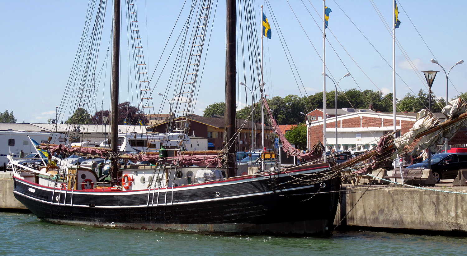 Helene af Ystad ligger i Ystads hamn 6 juni 2016.